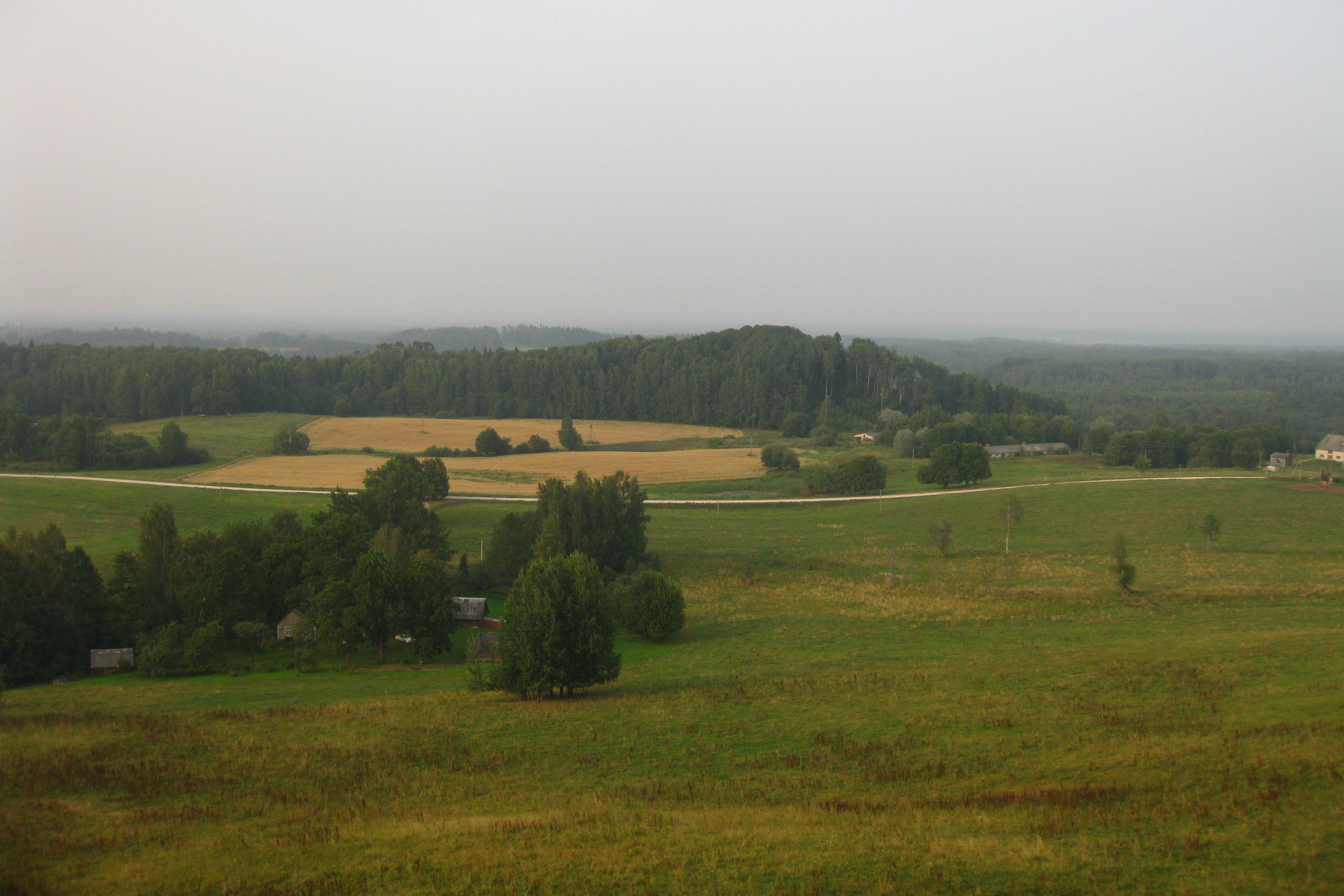 Vaade Karula rahvuspargis Tornimäe vaatetornist põhjasuunas.